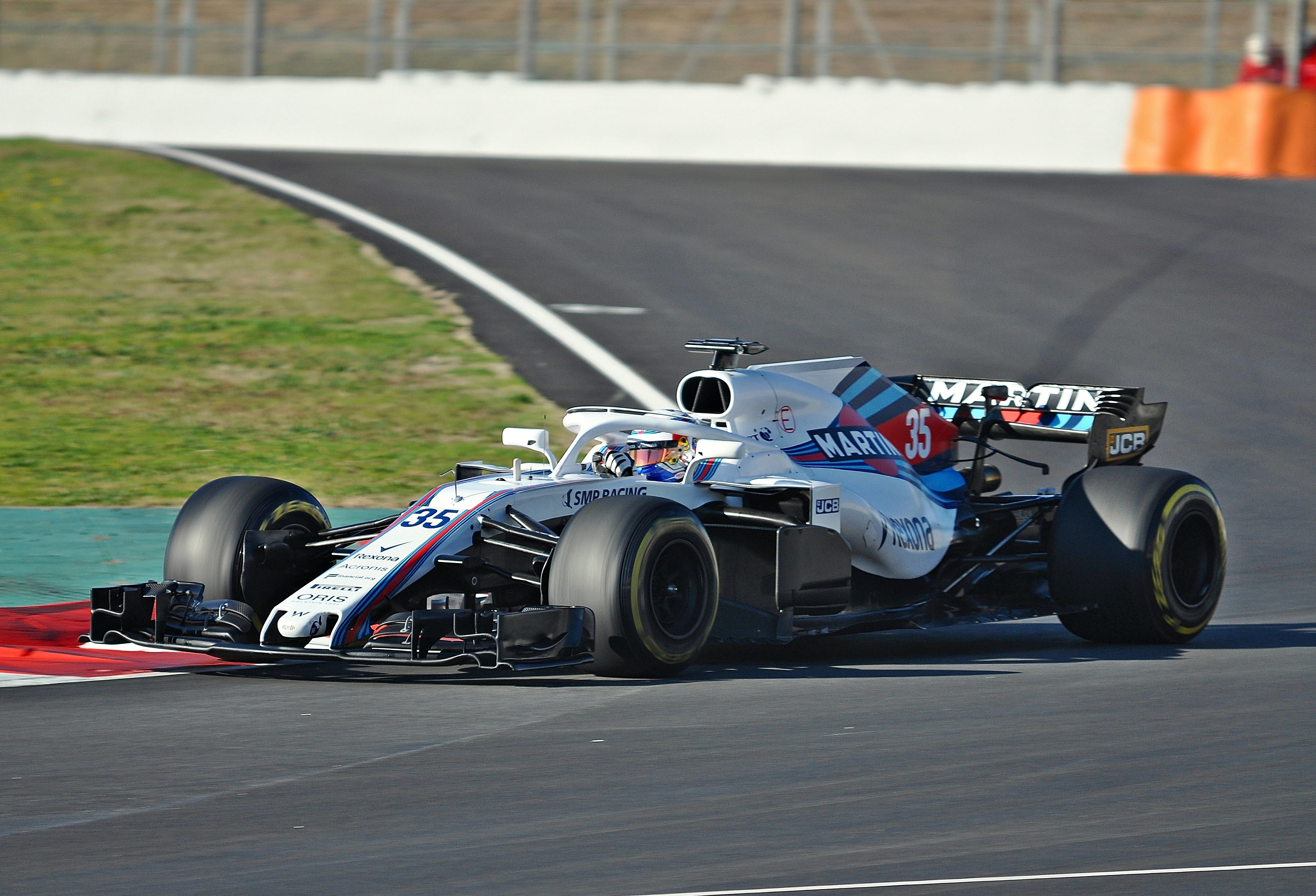 Williams FW41